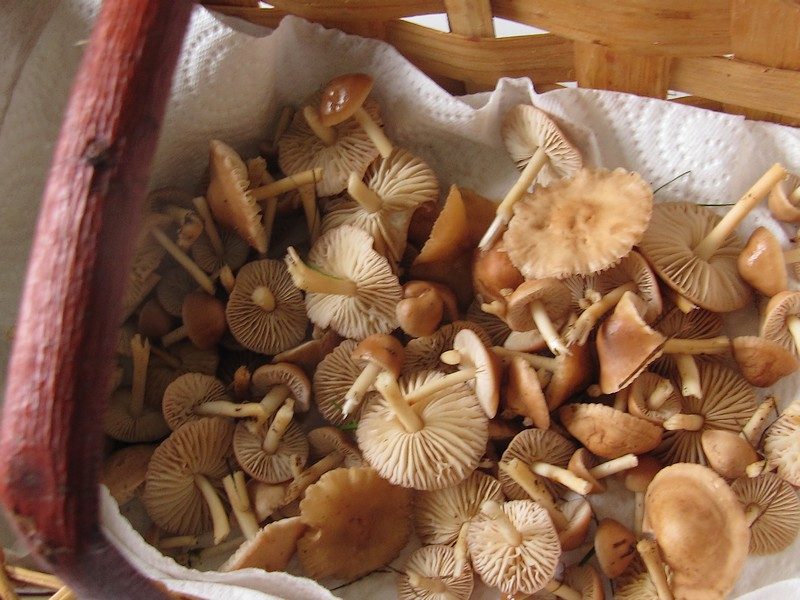 Marasmius oreades, Roiffieux (Ardeche/France)